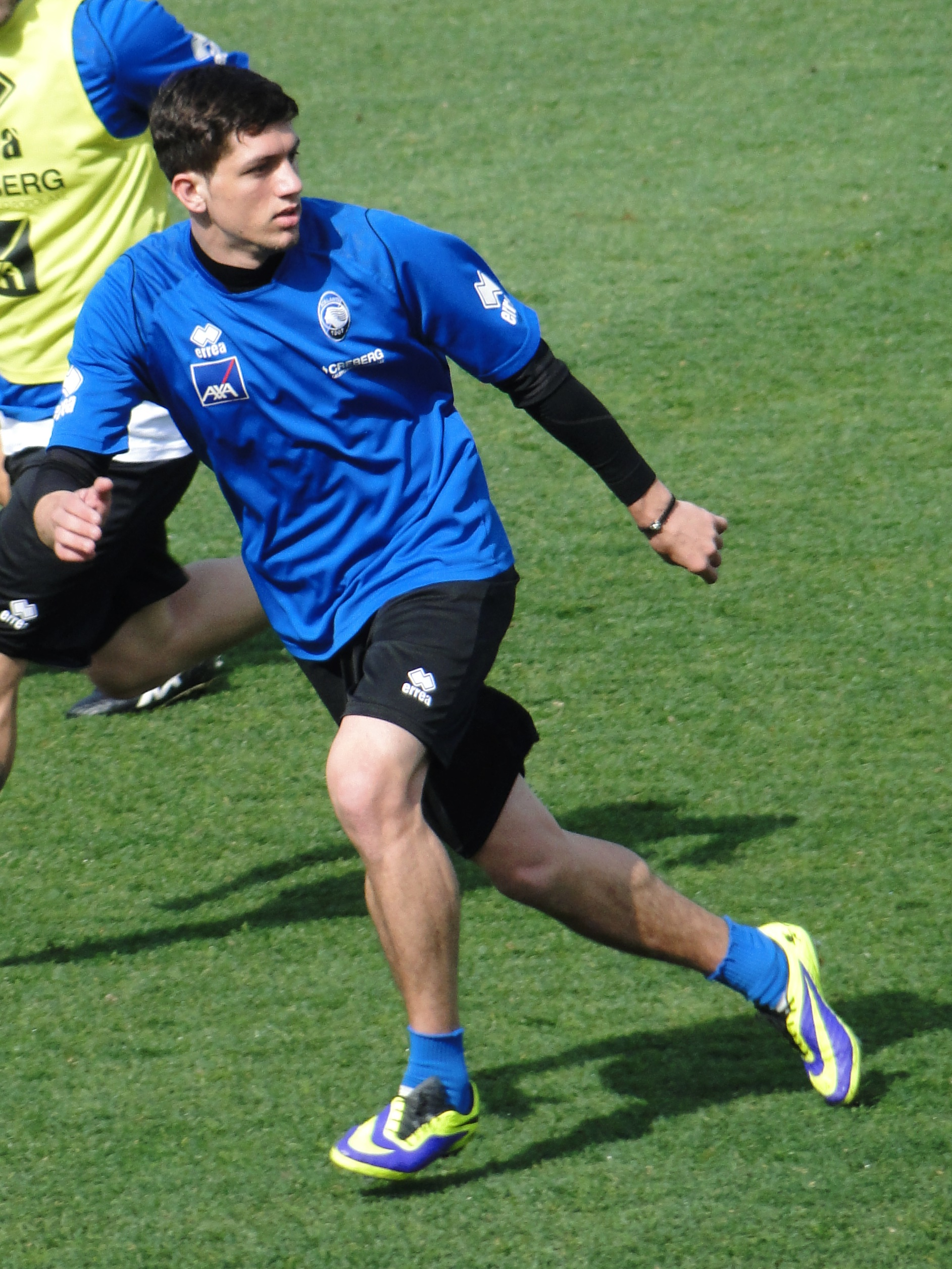 Constantin Nica, calciatore rumeno